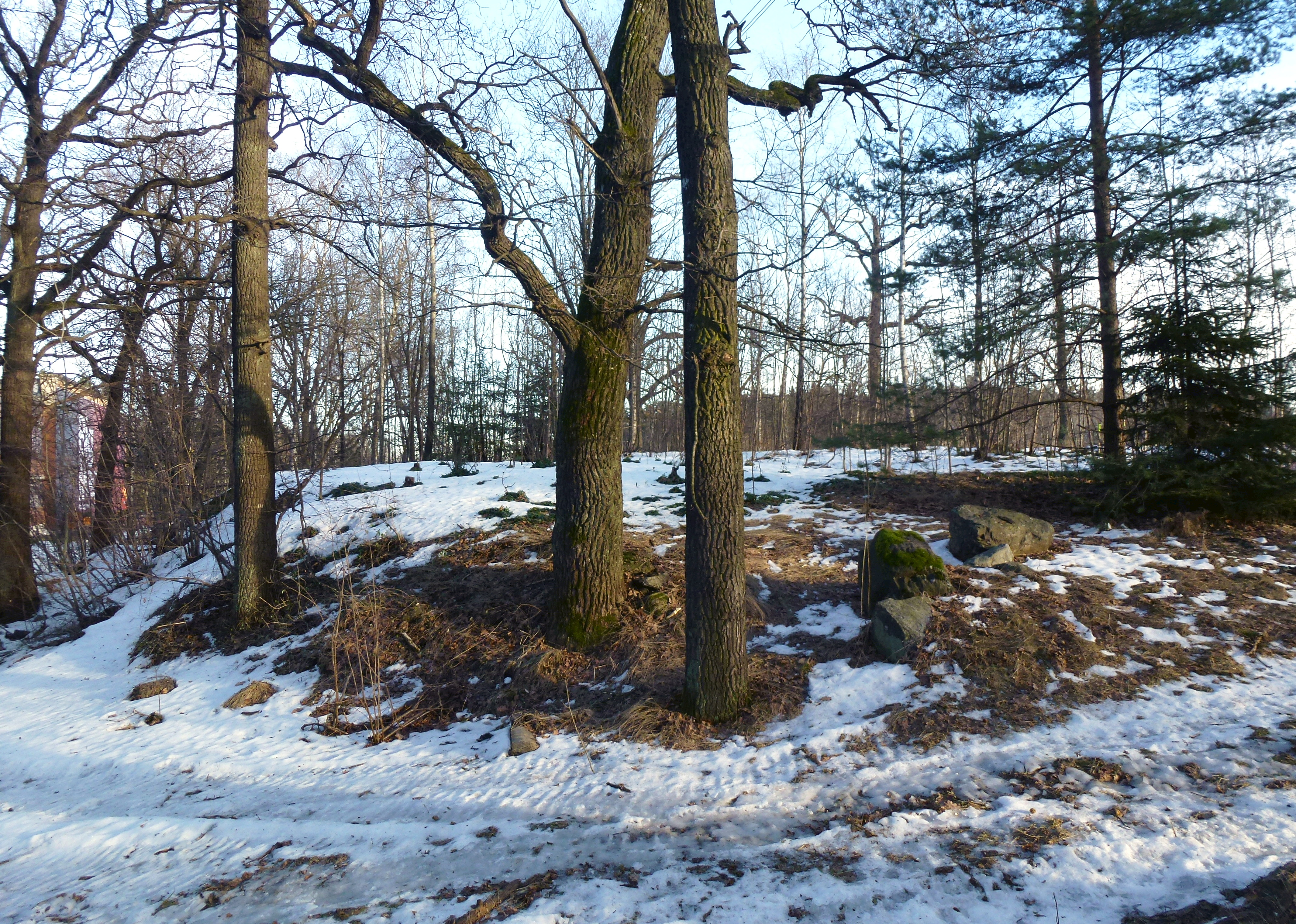 Vårby skola skoltomt